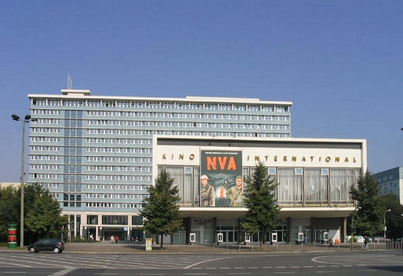 Description: Das Kino International in Berlin. Bauzeit: 1961-1963. Architekten: Josef Kaiser, Heinz Aust. Im Hintergrund das Rathaus Mitte. Bauzeit: 1996-1998. Architekten: Bassenge, Heinrich, Puhan-Schulz. View on Kino International and Rathaus Mitte, in Berlin. Source: self-made, I release it into the public domain. Gryffindor 01:45, 10 March 2006 (UTC)